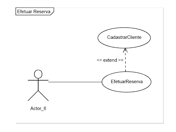 Nome : EfetuarReserva Atores : Cliente, Funcionario Finalidade : Efetuar a reserva de um quarto Visão geral : Este caso de uso tem a finalidade de efetuar a reserva de quartos mediante o cadastro do cliente Tipo : Essencial